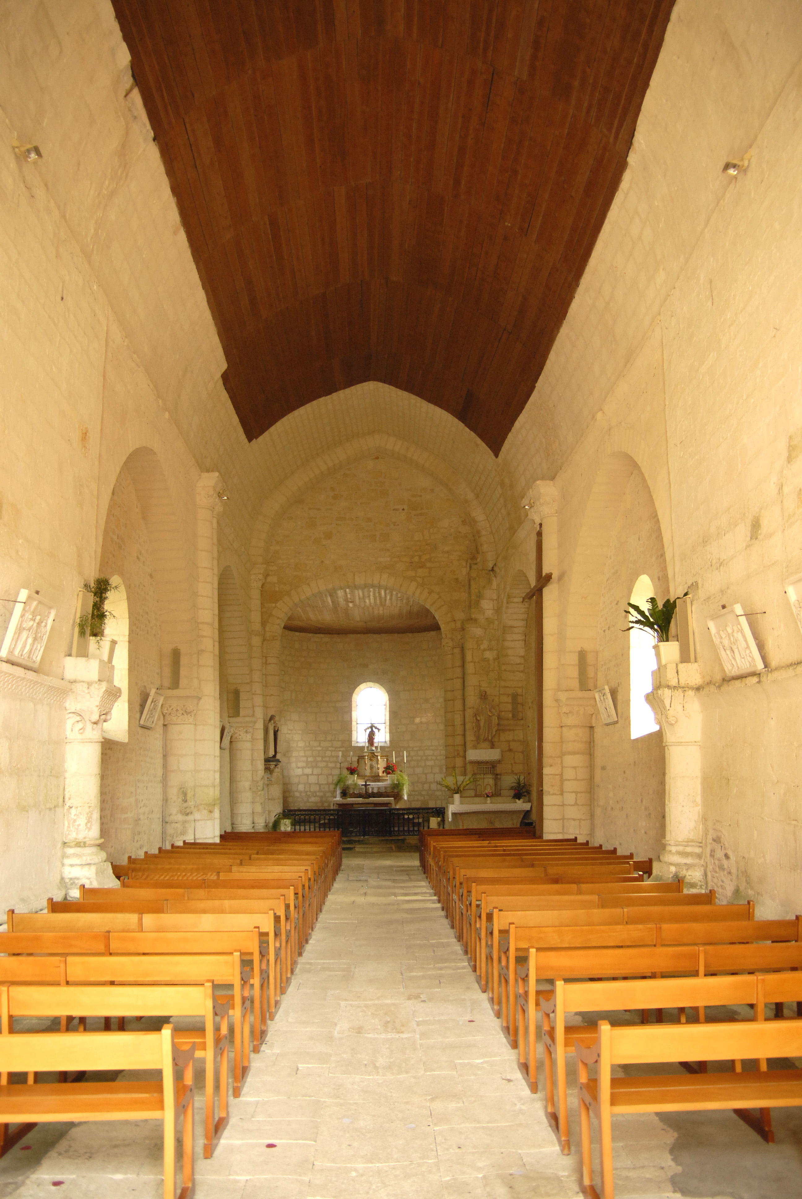 Fenioux,Schiff, Richtung Chor